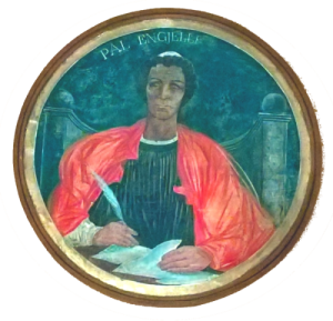 Pal Engjëlli